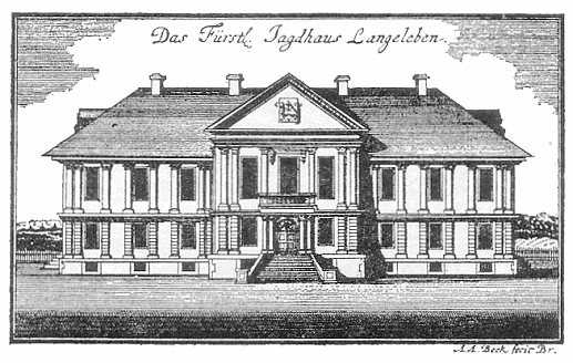 Das Jagdschloss Langeleben, ca. 1700-1830